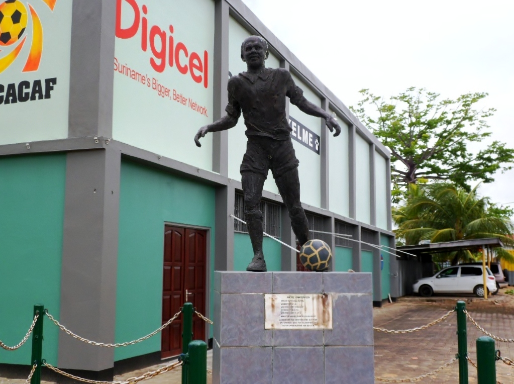 Andre Kamperveen standbeeld voor het kantoor van de Surinaamse Voetbalbond aan de Letitia Vriesdelaan 7 in Paramaribo